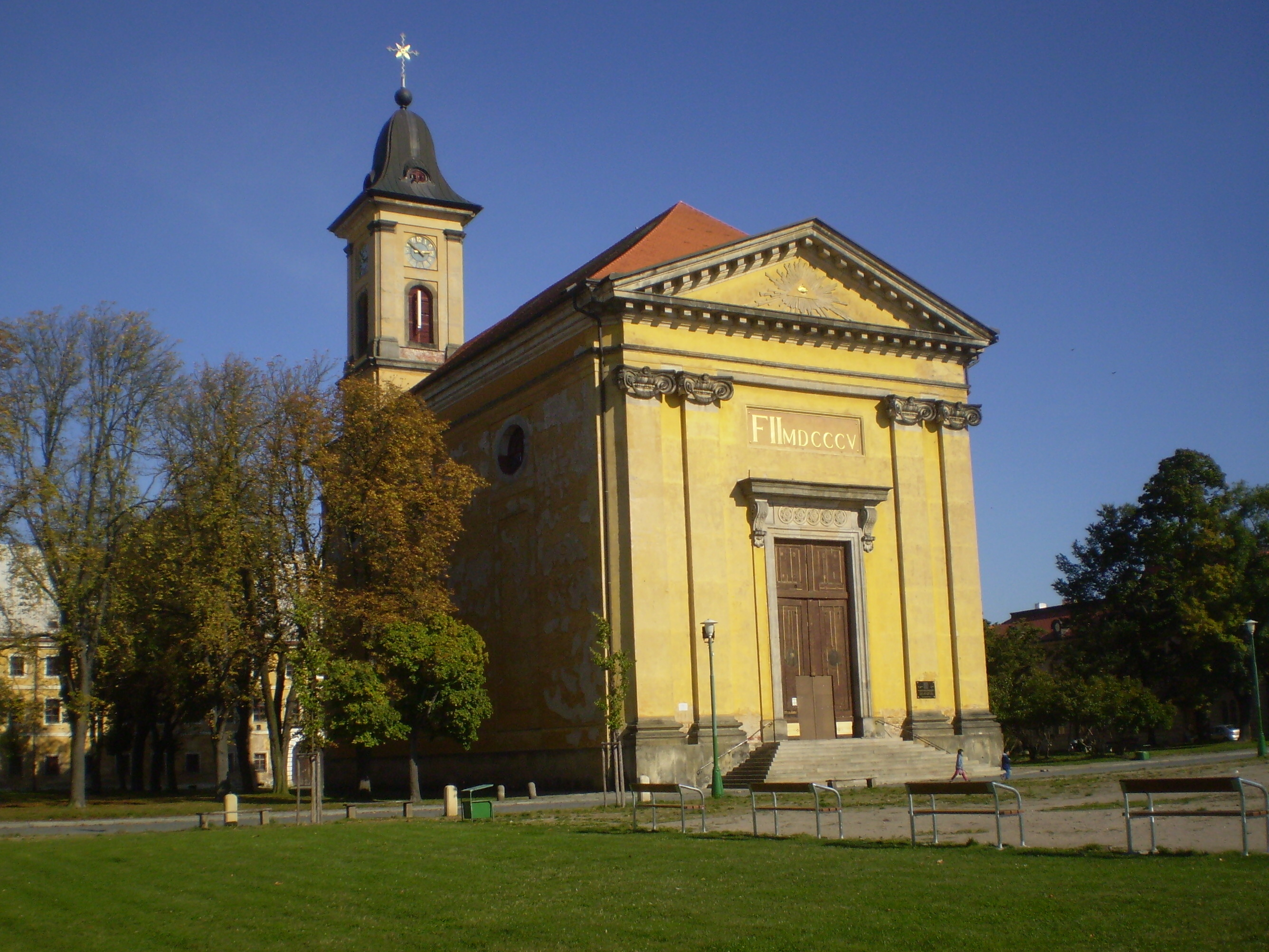 Kostel Nanebevstoupení Páně v Josefově (Jaroměř)